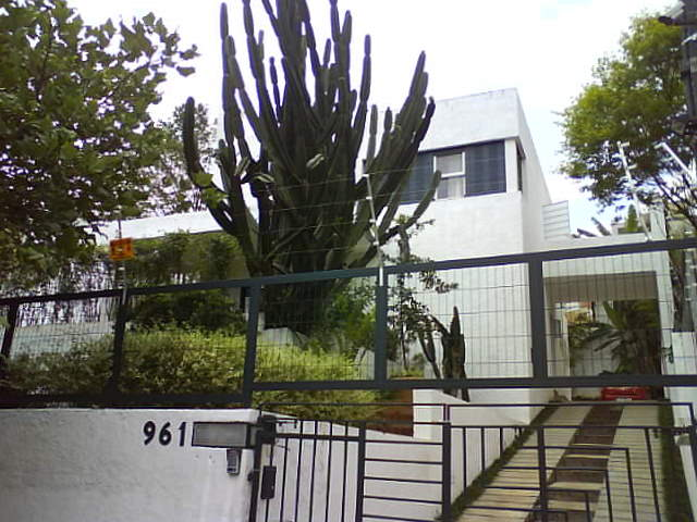 Casa Modernista da Rua Itápolis, São Paulo, Brasil.